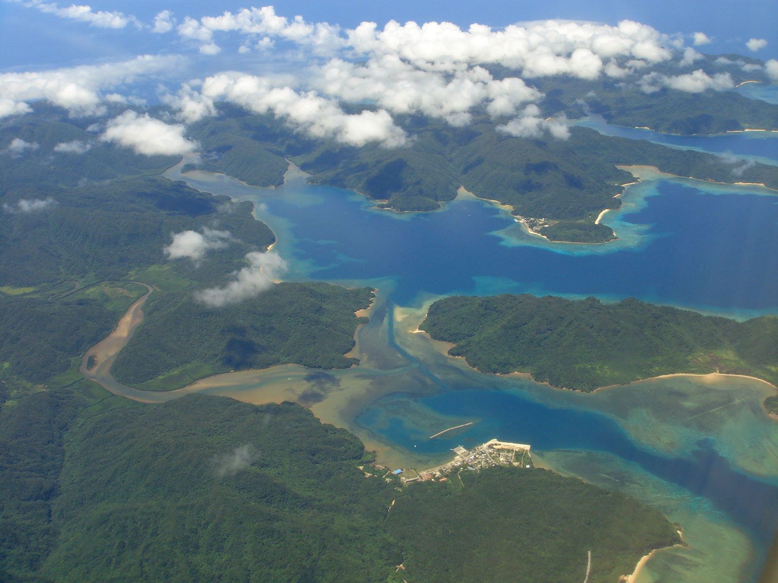 Funauki, Iriomote Island, Taketomi Town, Yaeyama District, Okinawa, Japan (沖縄県八重山郡竹富町西表島舟浮地区)